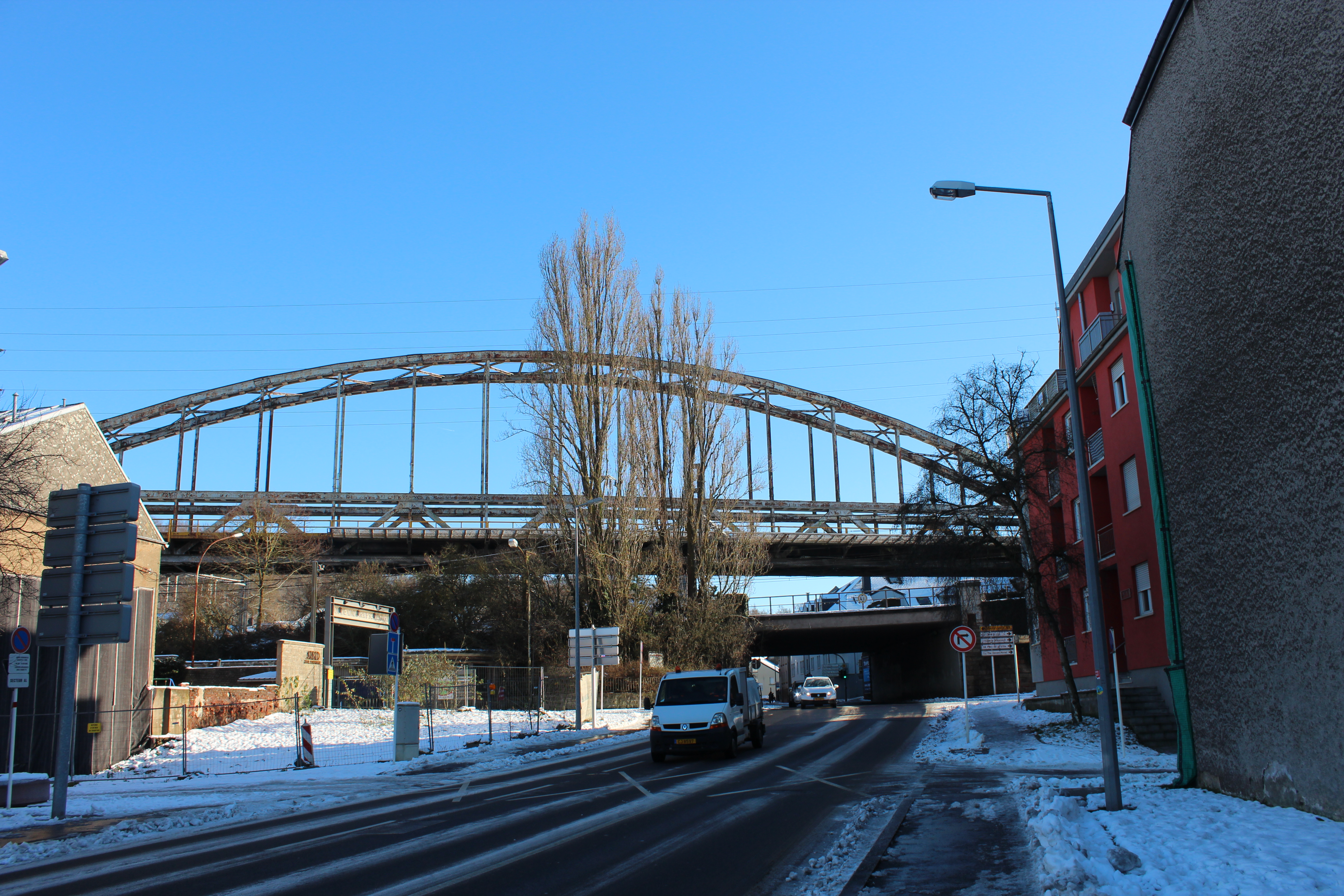 Déi fréier Eisebunnsbréck, déi Arbed Schëffleng mat Terres Rouges verbonnen huet, och Ronn Bréck genannt, zu Esch-Uelzecht.